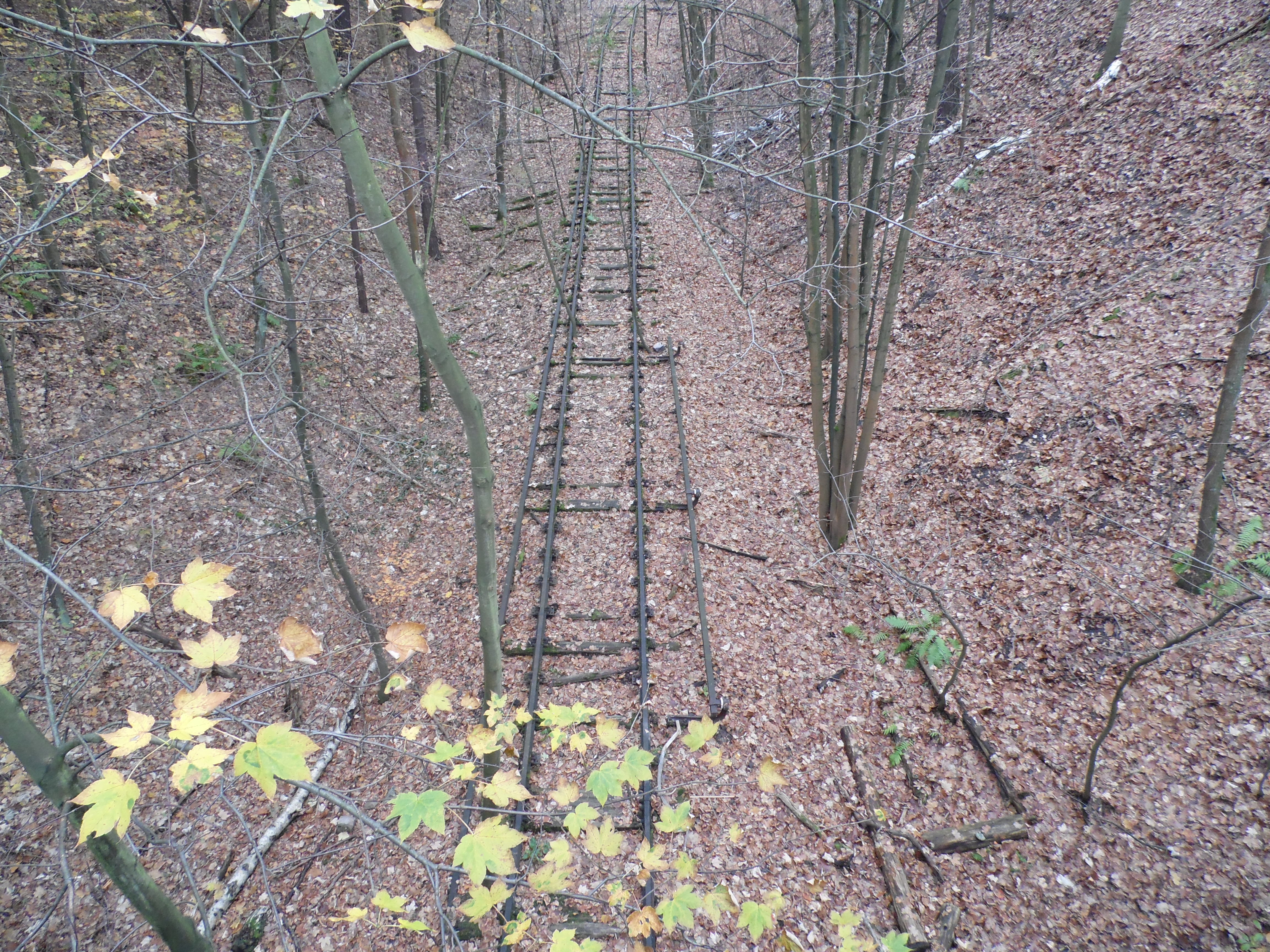 Reste der Friedhofsbahn oder Stahnsdorfer Bahn im Wald